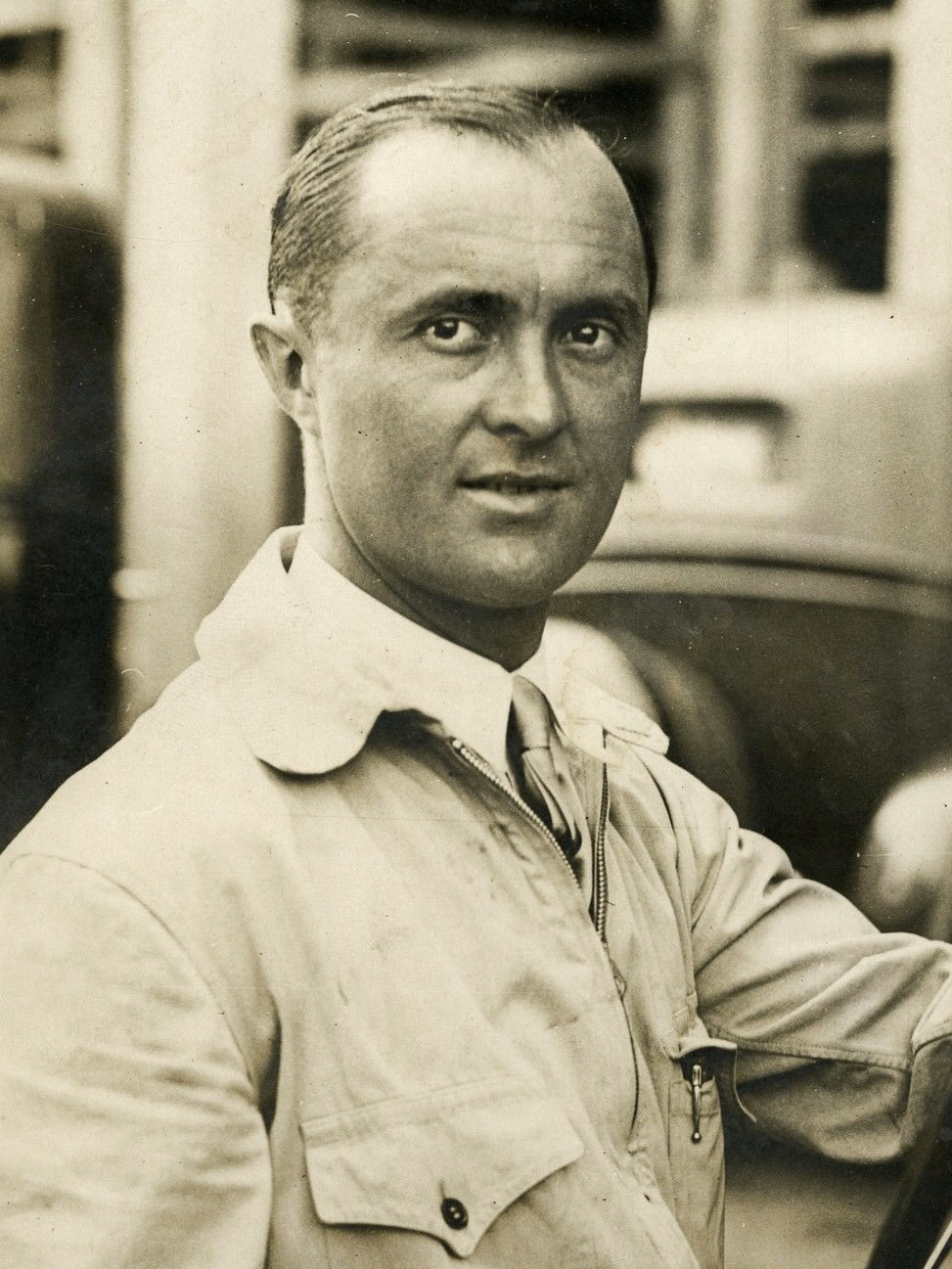 "CHIRON vainqueur s/BUGATTI (A.C.F. 1931)" Photo originale G. DEVRED (Agce ROL)